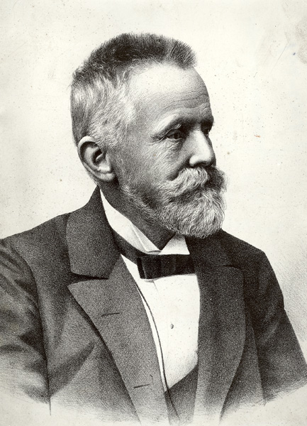 Vilém Jičinský (1832 – 1902) byl ostravský báňský odborník.